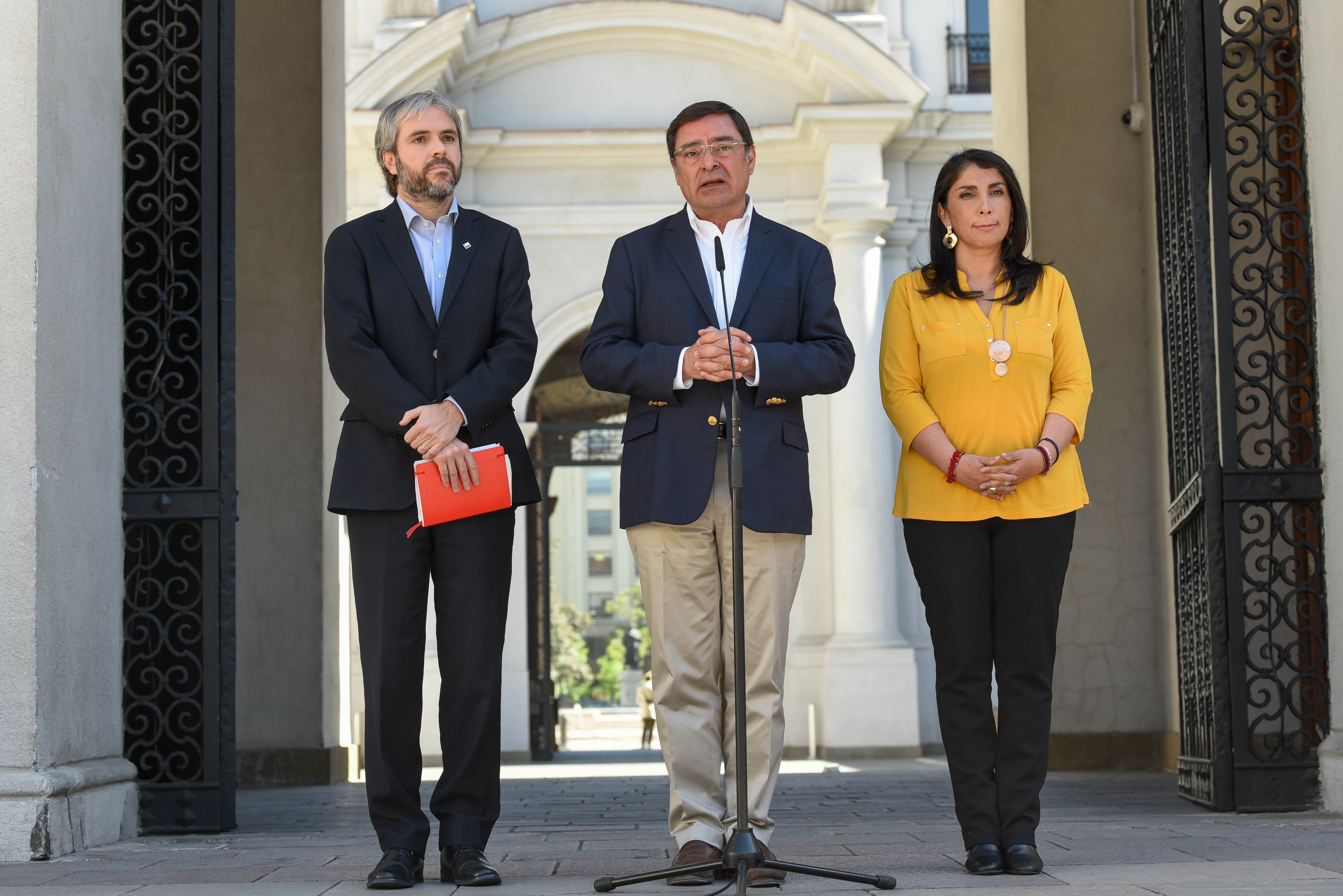 Vocería de la Ministra Karla Rubilar junto al Ministro del Interior, Gonzalo Blumel y el nuevo Intendente de la RM, Felipe Guevara.